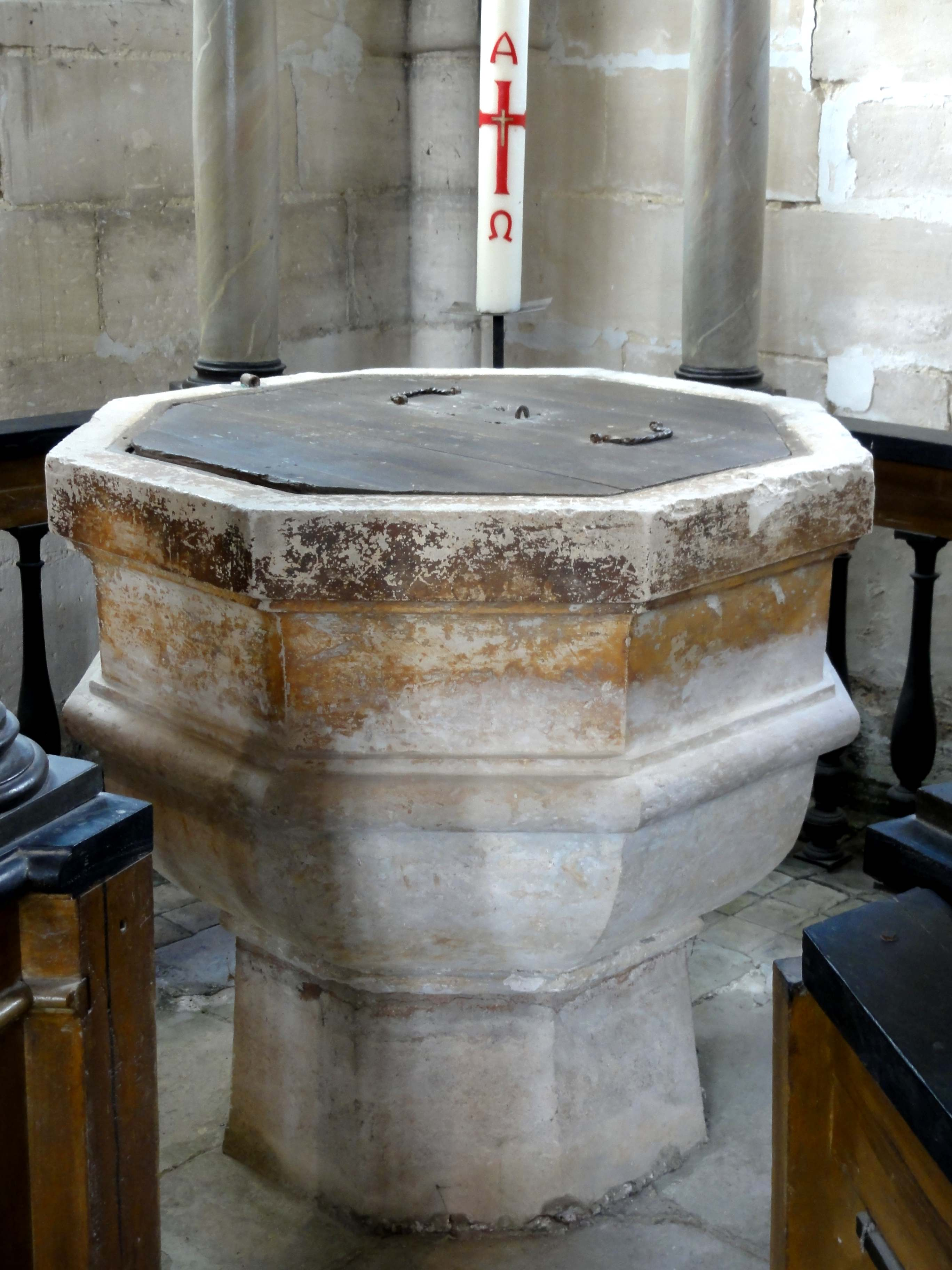 Mobilier de l'église - voir le titre du fichier.